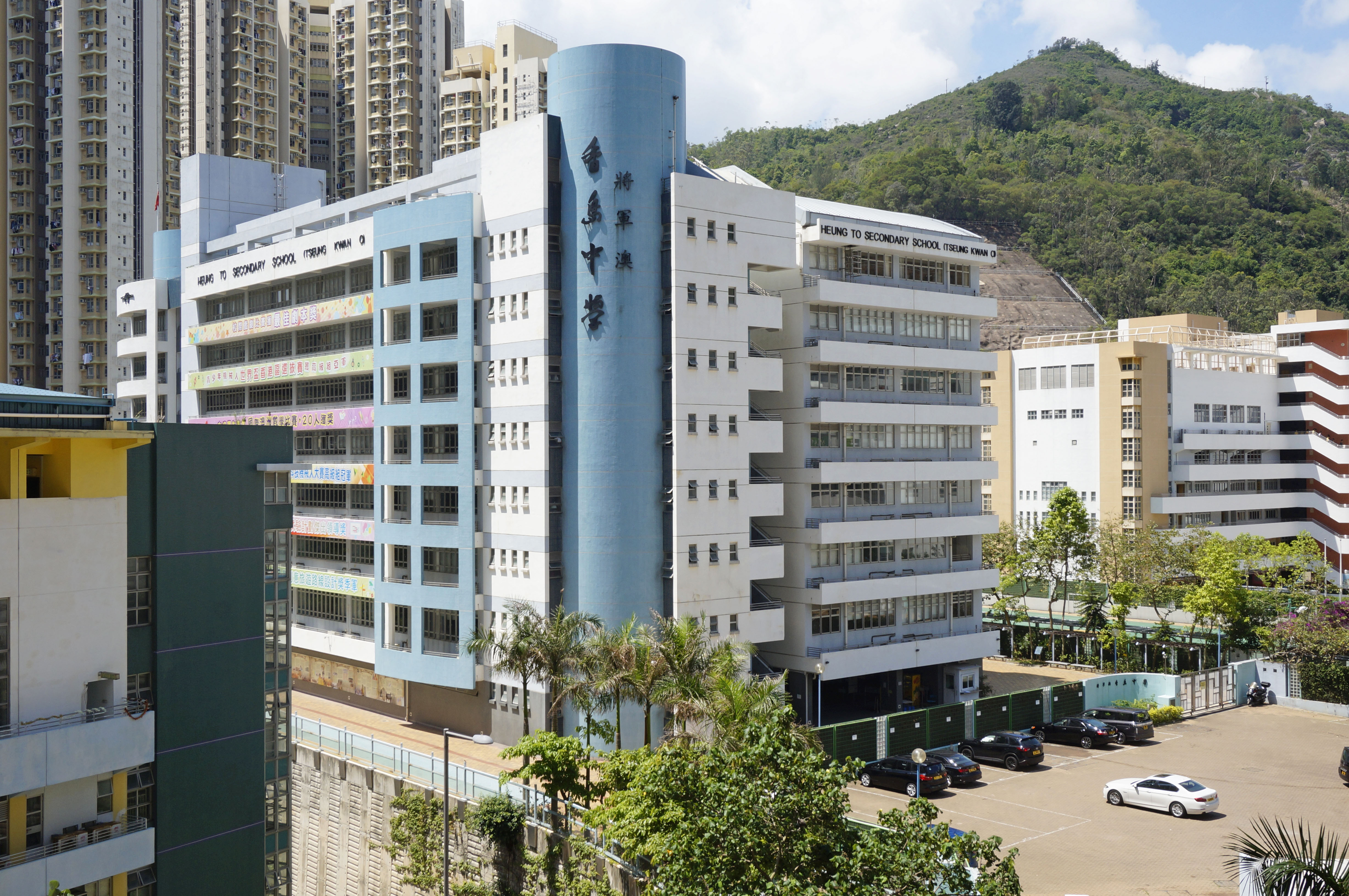 將軍澳香島中學調景嶺校舍外貌